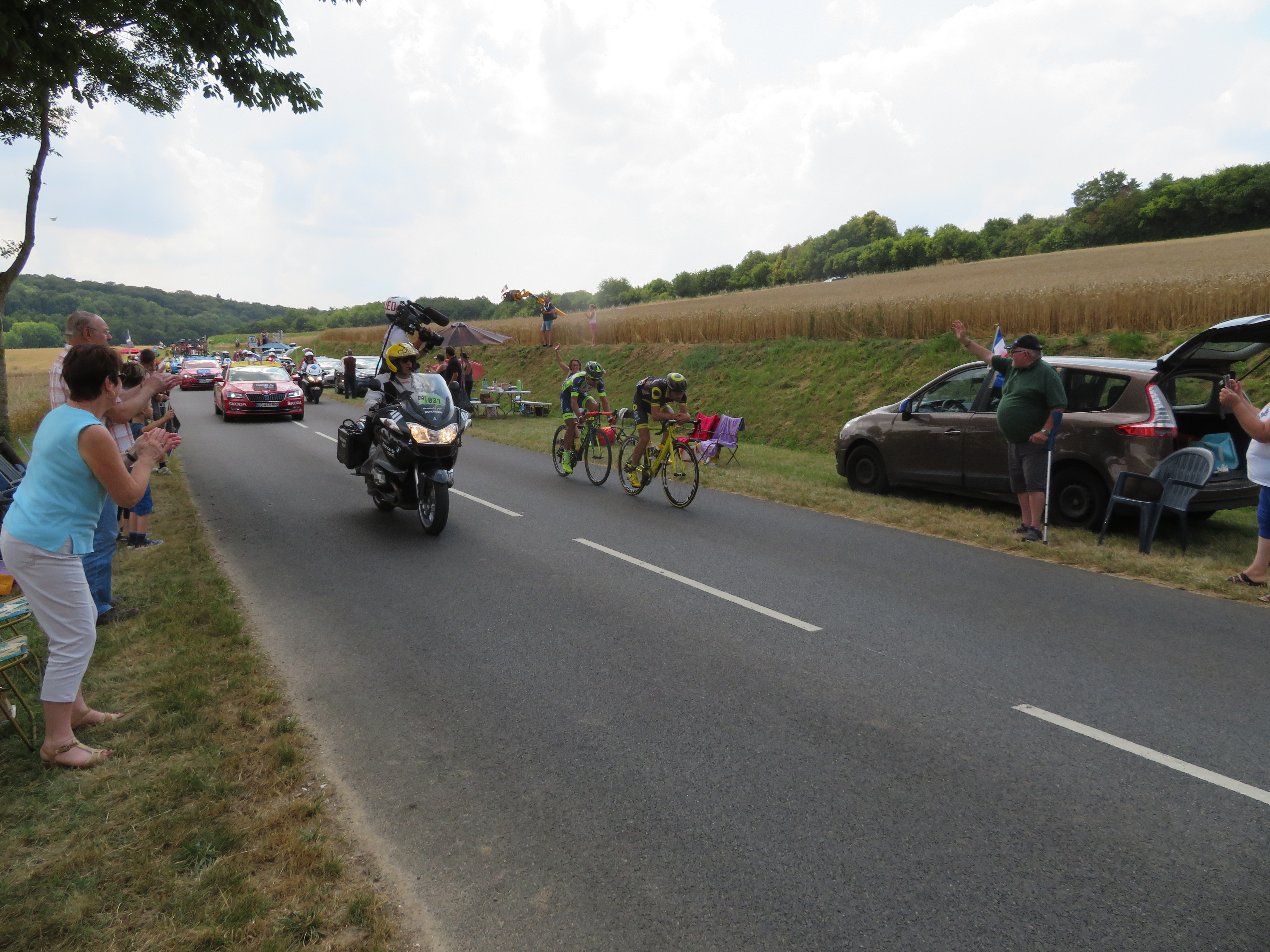 Les coureurs cyclistes Fabien Grellier et Marco Minnaard, échappés lors de la 8ème étape du Tour de France 2018, entre Dreux et Amiens-Métropole. La photo a été prise au niveau de la commune du Gallet (Oise).